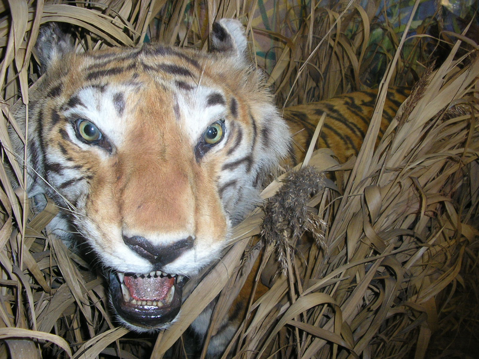 Le tigre naturalisé du muséum d'histoire naturelle de Rouen